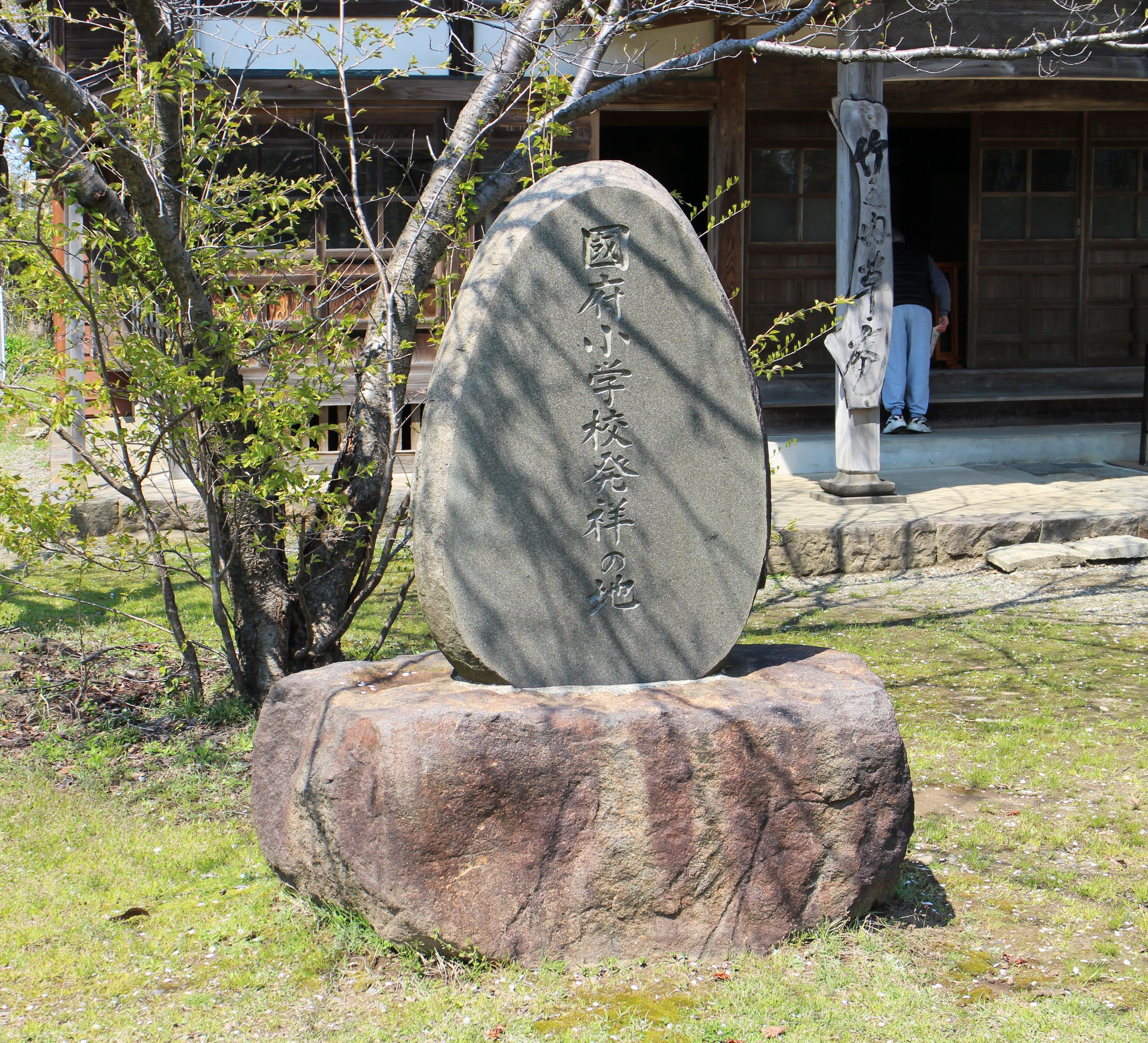 国府小学校発祥の地